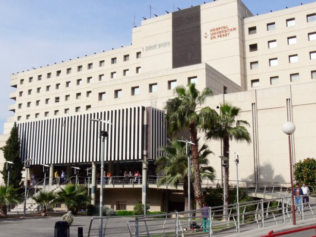 Hospital Doctor Peset de Valencia